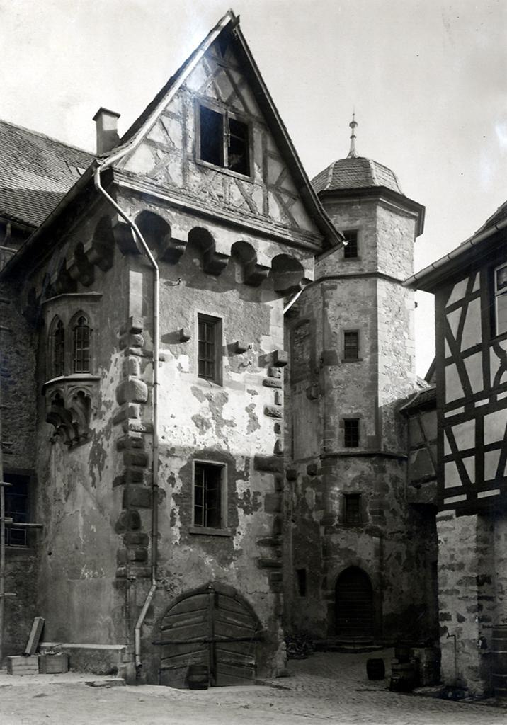 Rathaus in Heppenheim, Rückansicht, um 1900